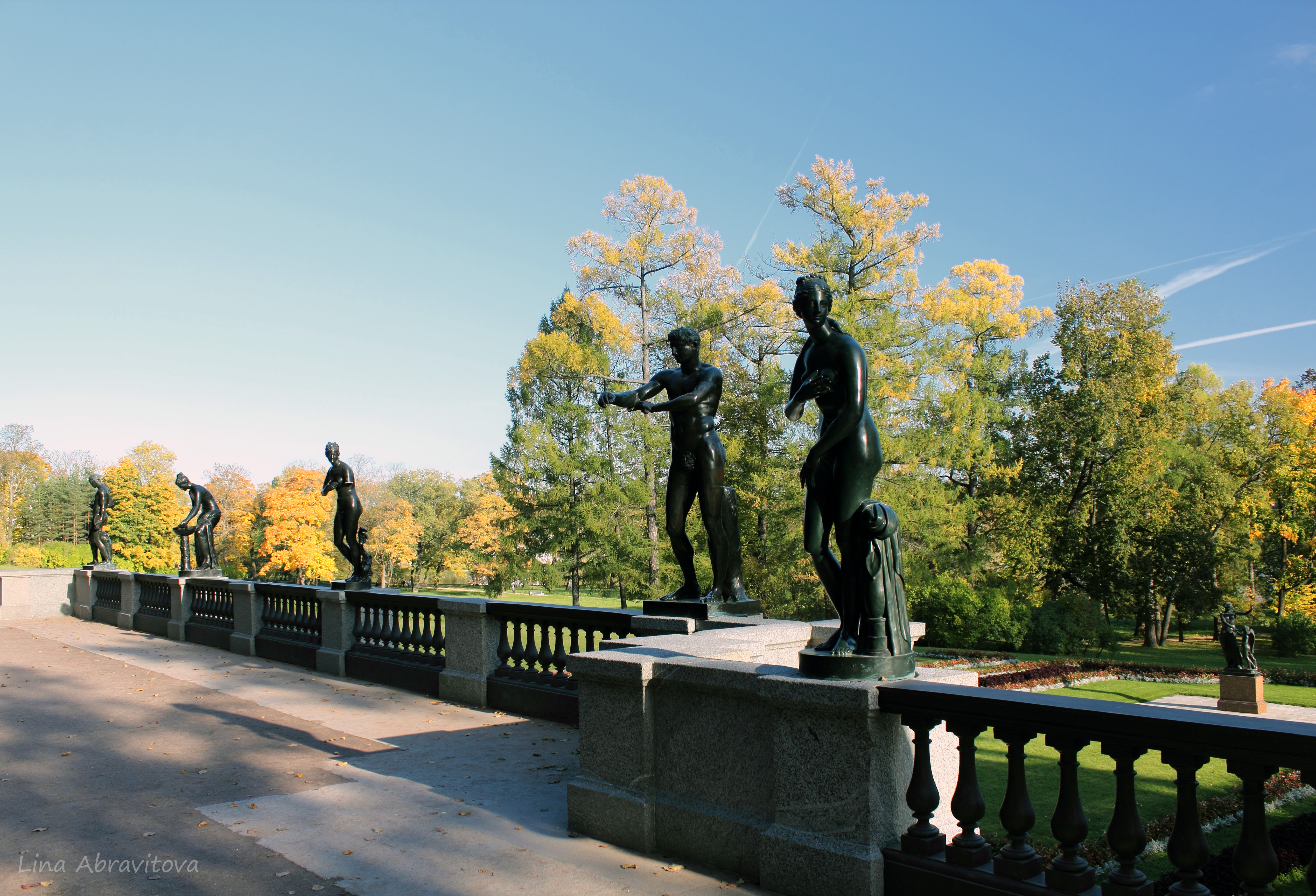 Гранитная терраса («терраса Руска») со статуями (копии с античных оригиналов) арх. Гамбургер И., арх. Руска Л. И. (Санкт-Петербург и Лен.область, Пушкин, Рамповая аллея)